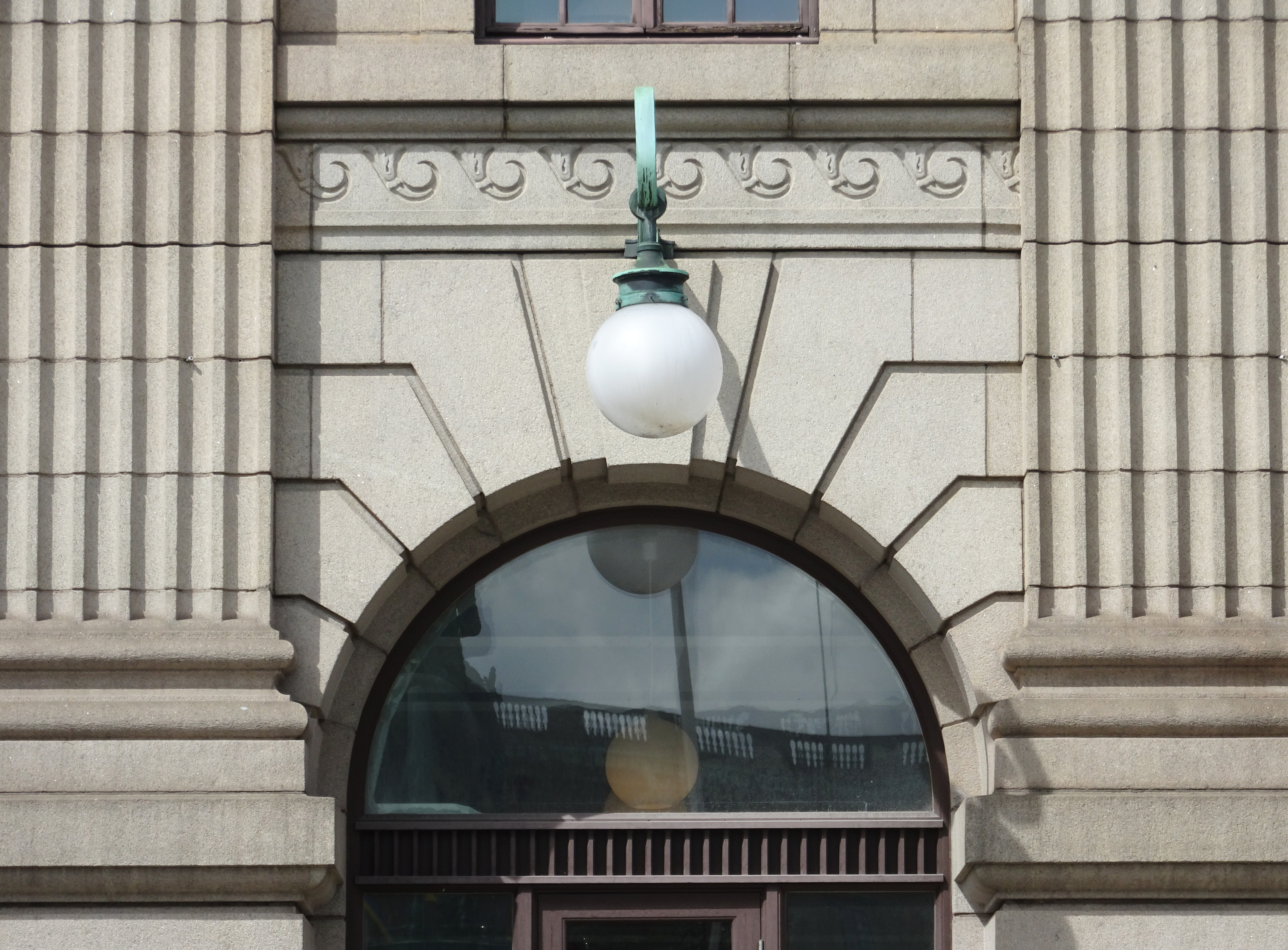 Före detta Skandinaviska Bankens palats, Kvarteret Vinstocken.